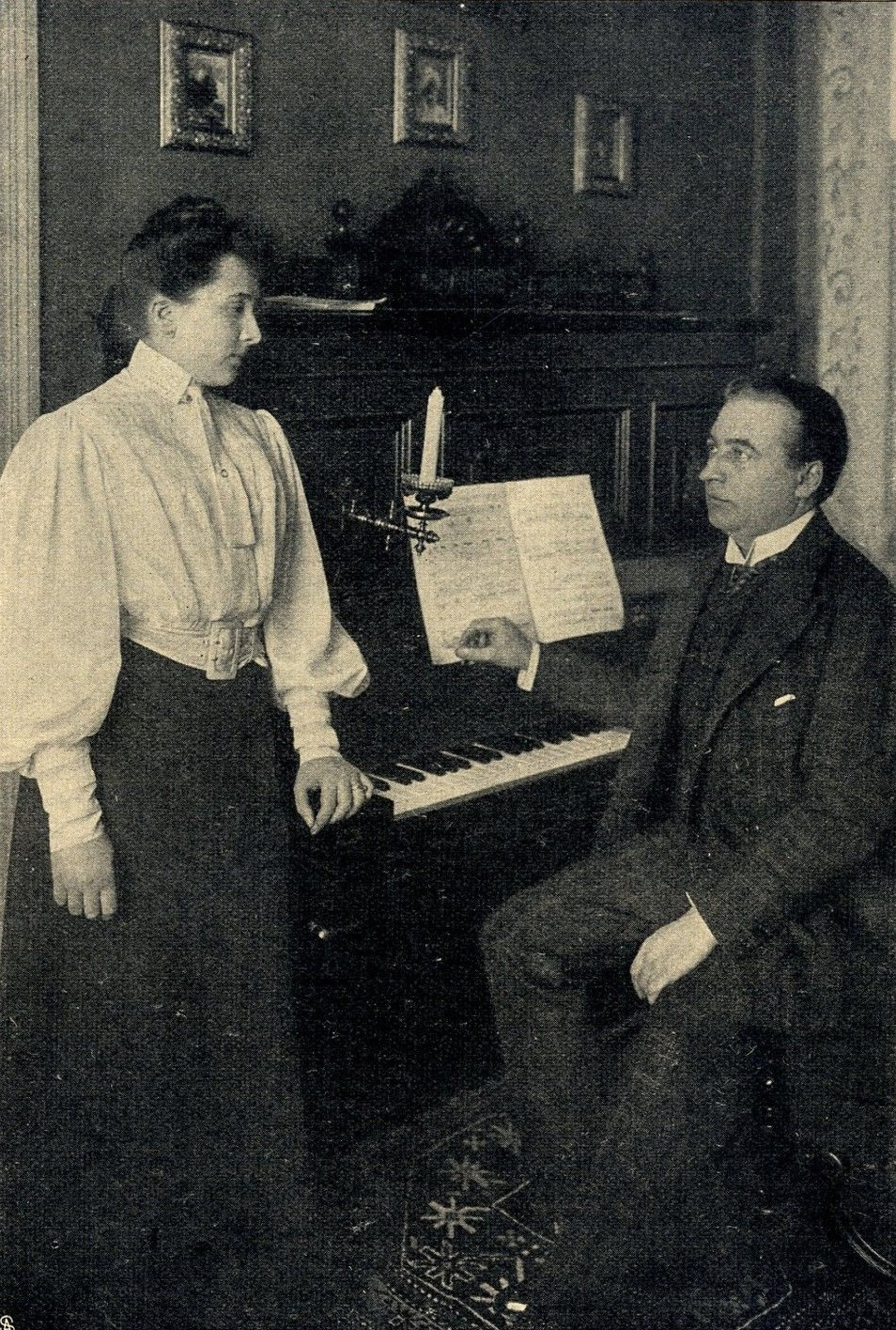 Der kgl. Sänger Marian Alma und seine Tochter. Spezialaufnahme für "Die Woche", 1907